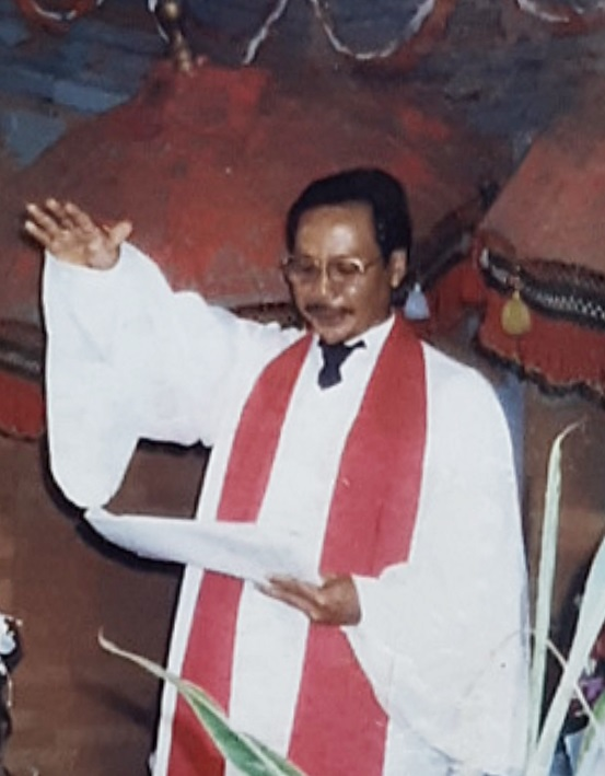 Pdt. Ketut Kosta